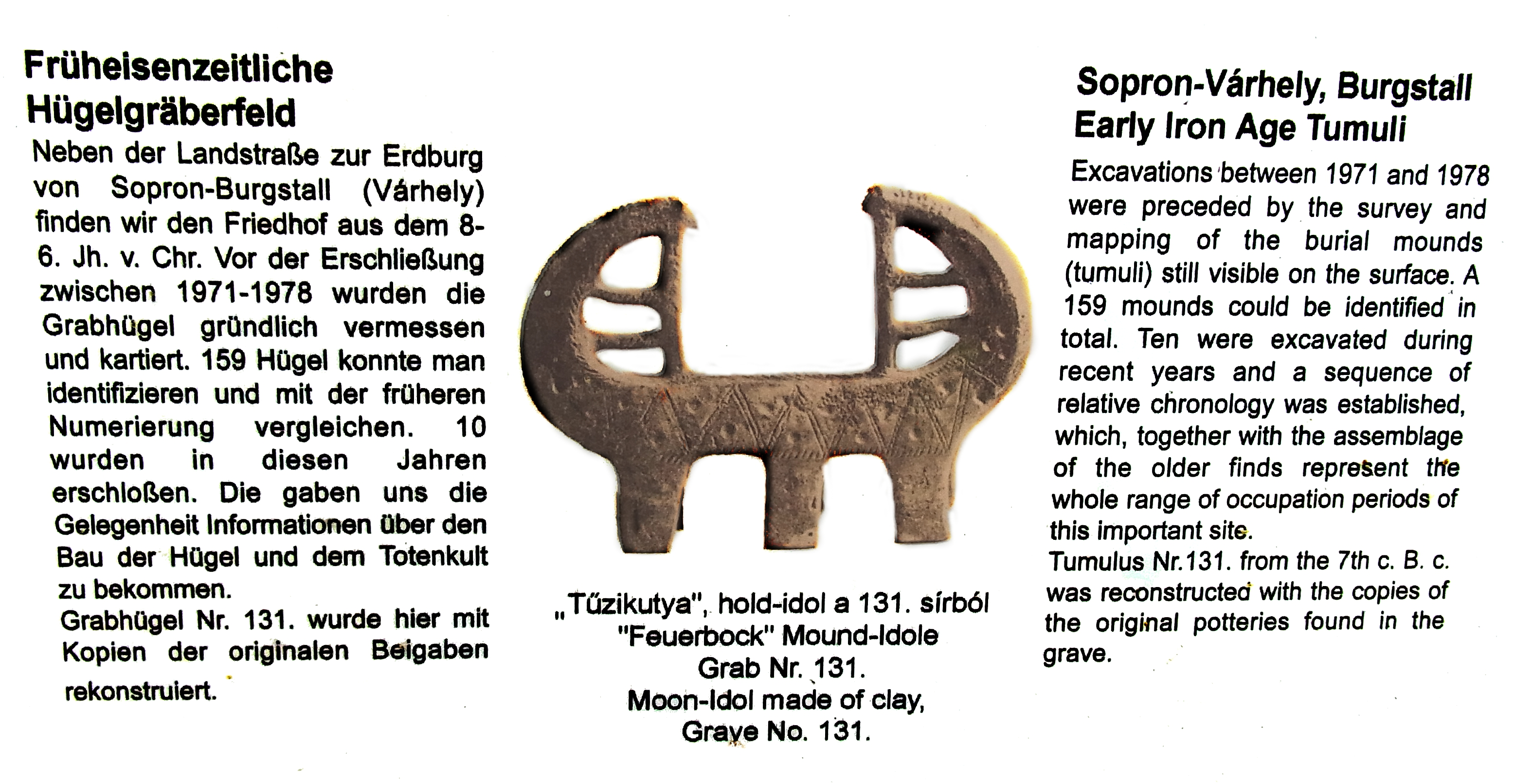 Erklärender Text zur Rekonstruktion eines Grabhügles der Freilichtausstellung auf dem Gräberfeld Sopron (Ungarn)